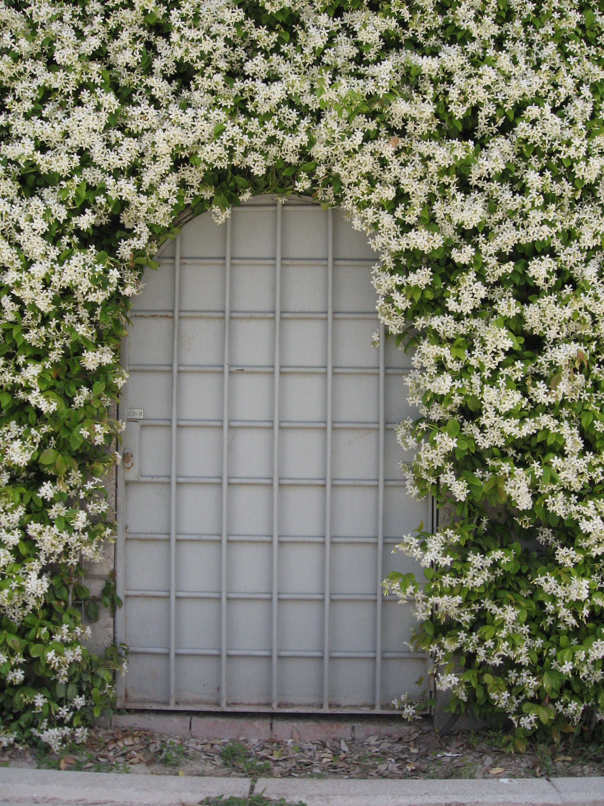 Trachelospermum jasminoides. Real Jardín Botánico de Madrid.